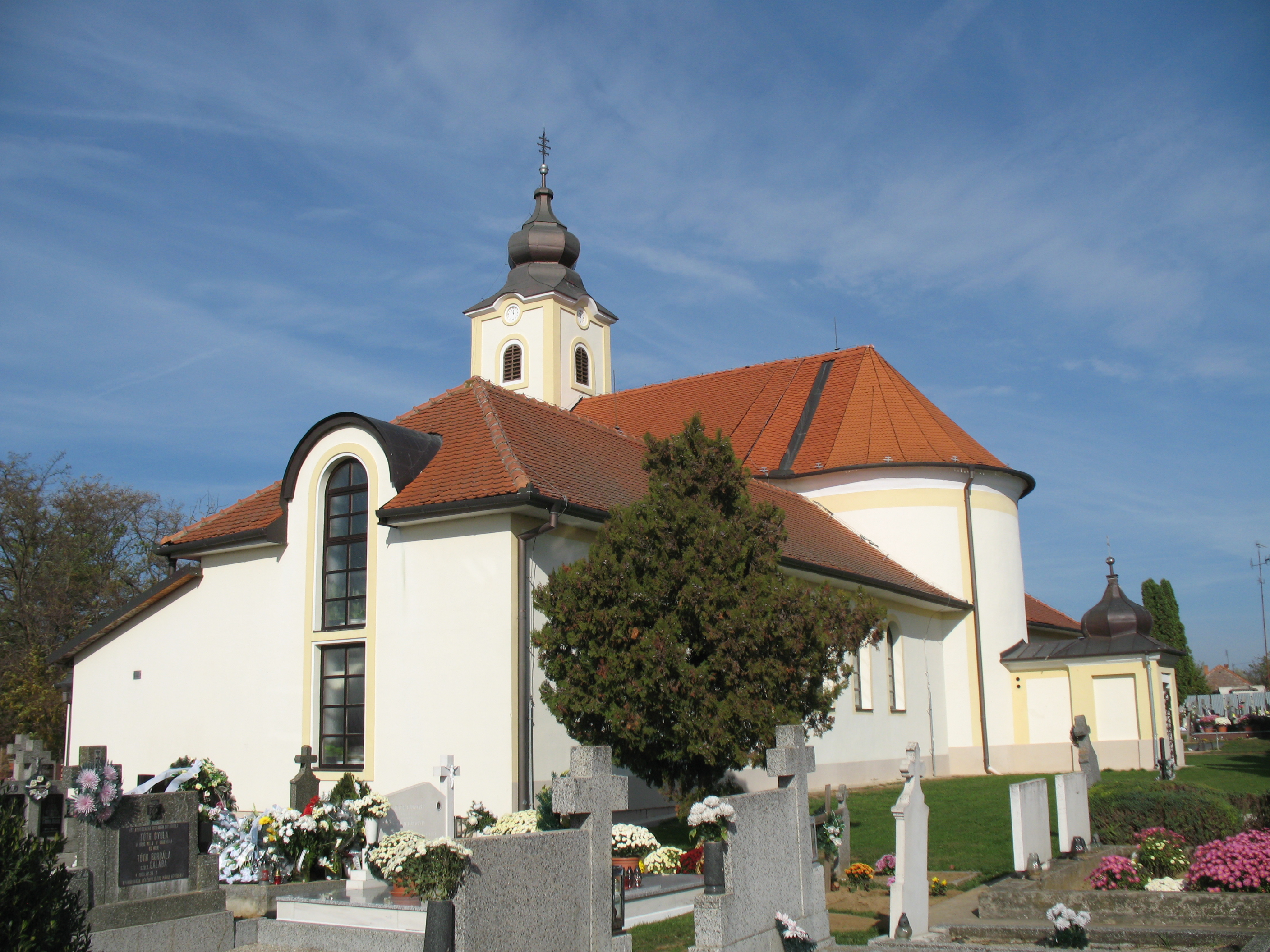 Kalász